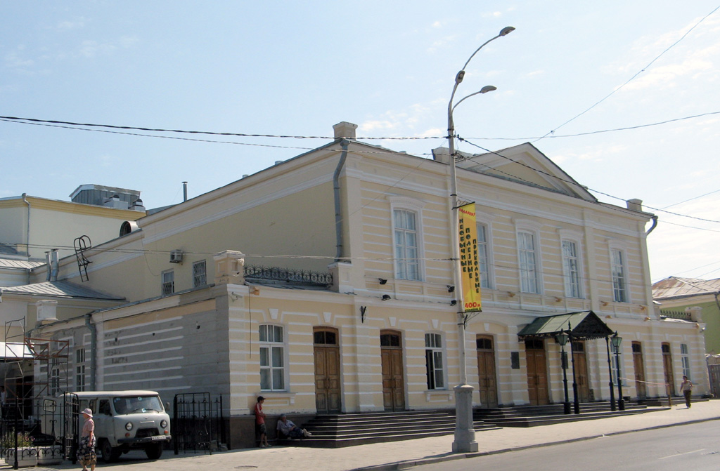 Таганрогский ордена Почёта драматический театр имени А.П. Чехова; Chekhov's theatre in Taganrog